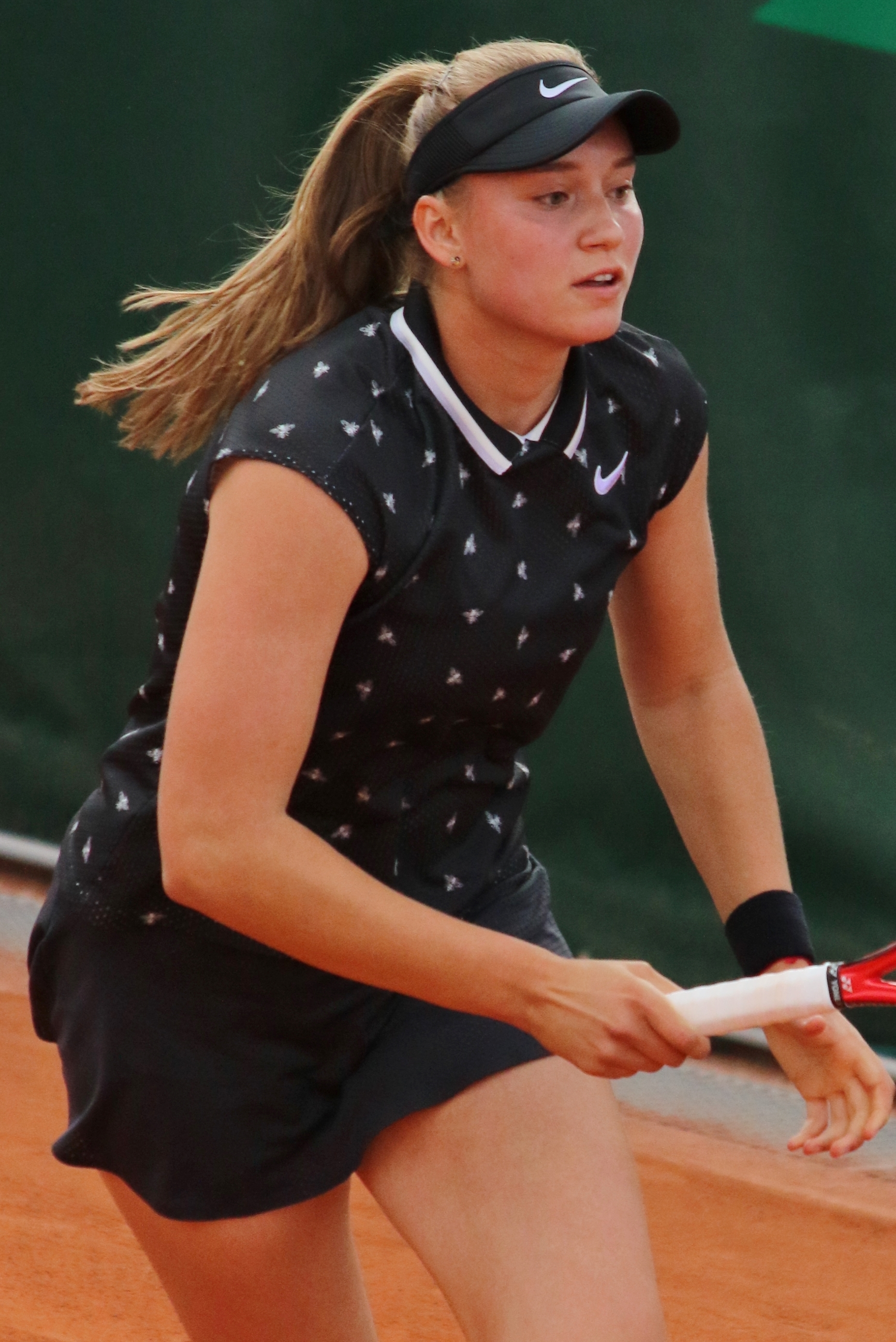 Rybakina RG19 (4)